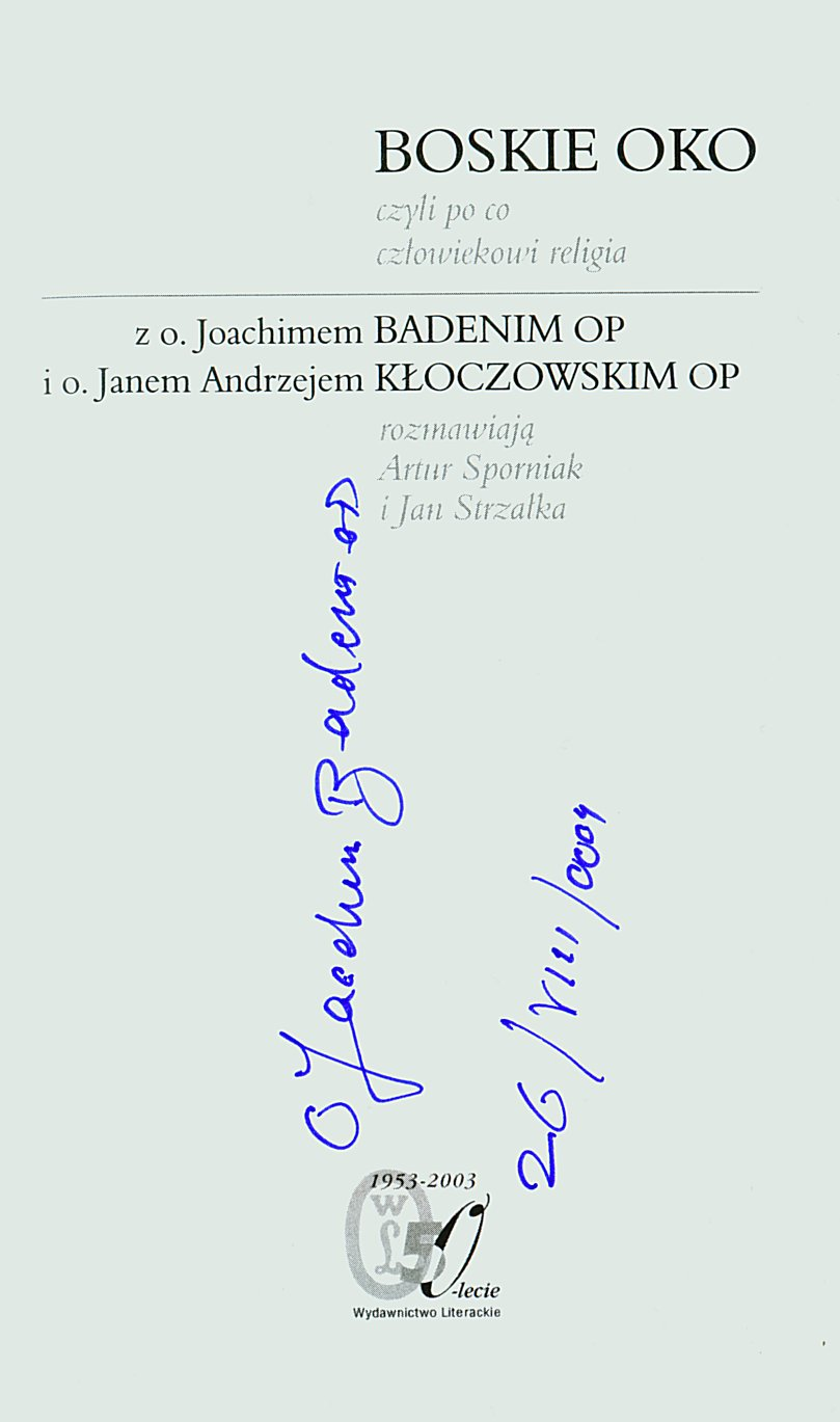 Joachim Badeni (1912-2010) - Autograph